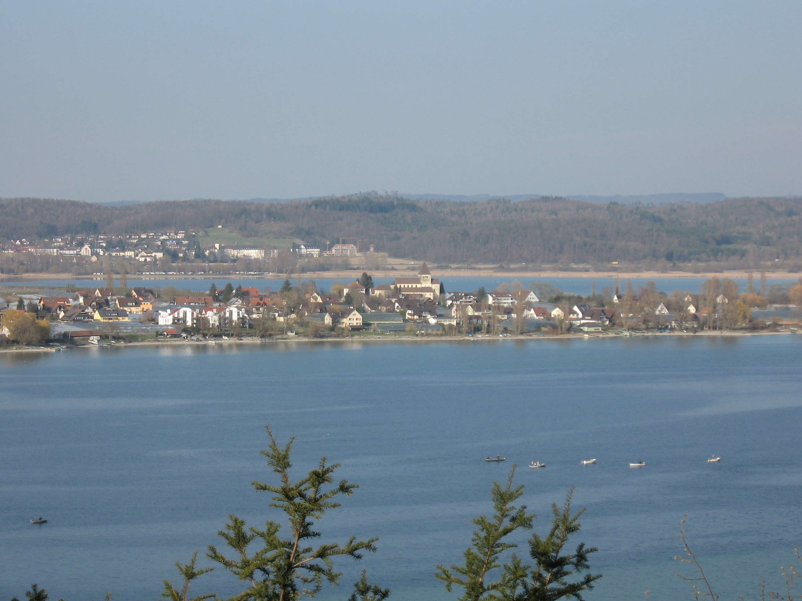 St. Georg, Insel Reichenau, Aufnahme vom Arenenberg (CH)